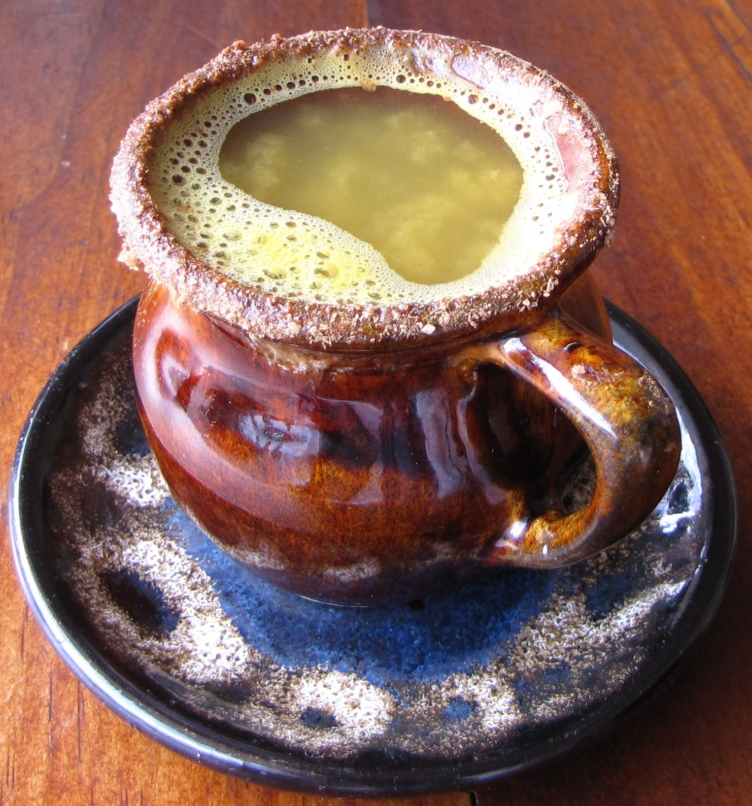 Colombian canelazo